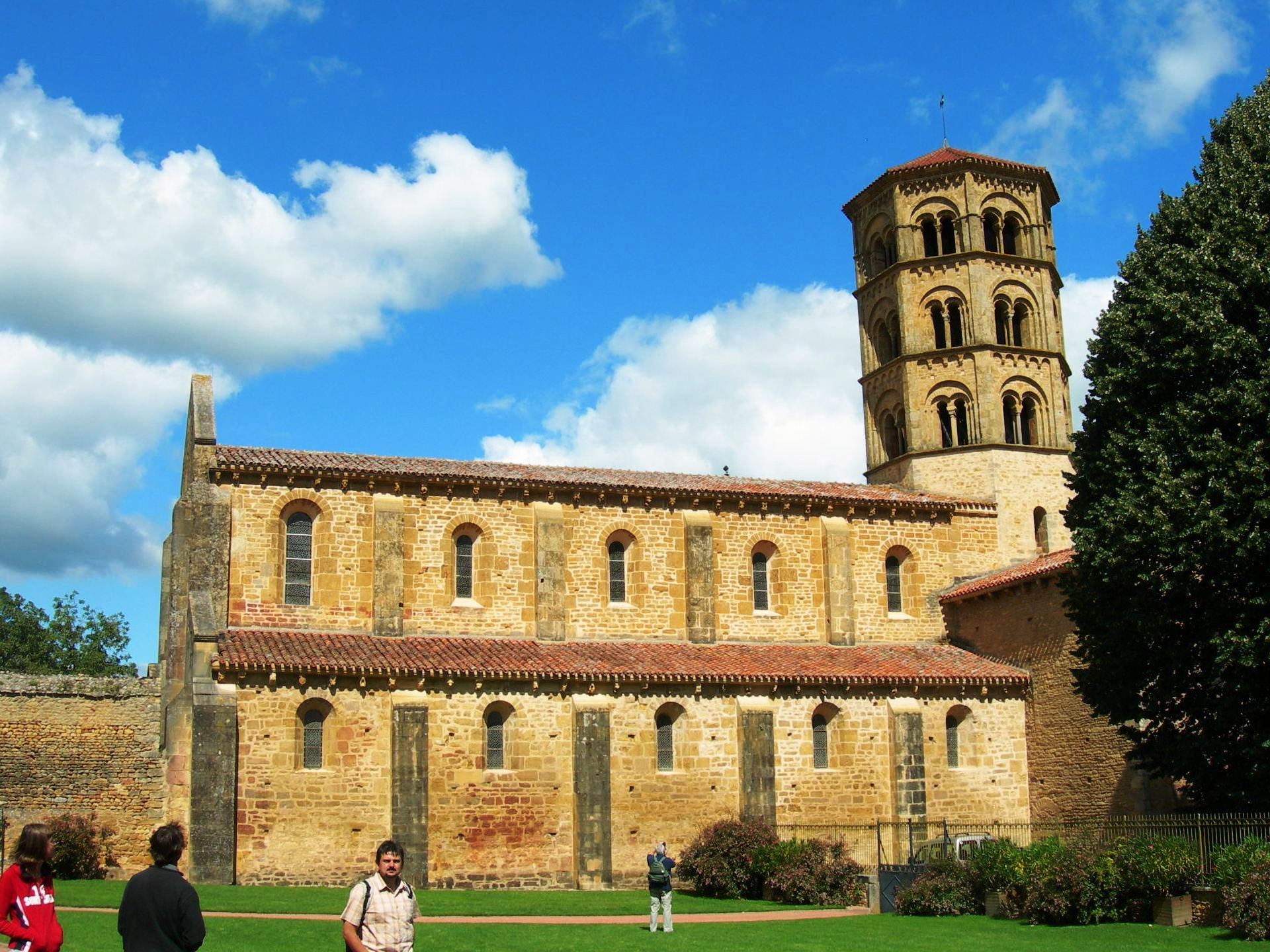 Anzy le Duc (F).)